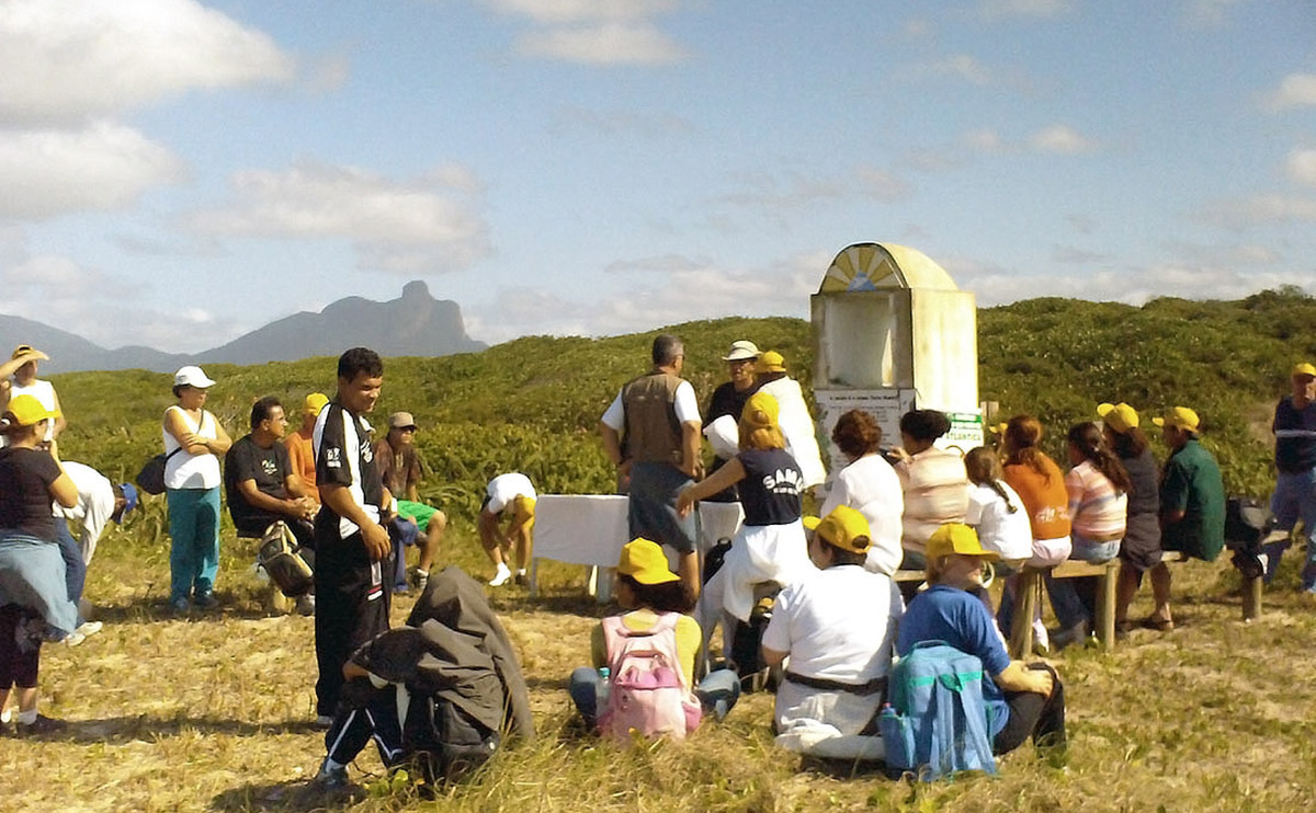 Romaria do Bom Jesus de Iguape à Praia do Una, Juréia. Marco erguido no local do encontro da imagem do Senhor Bom Jesus de Iguape, em 1647.